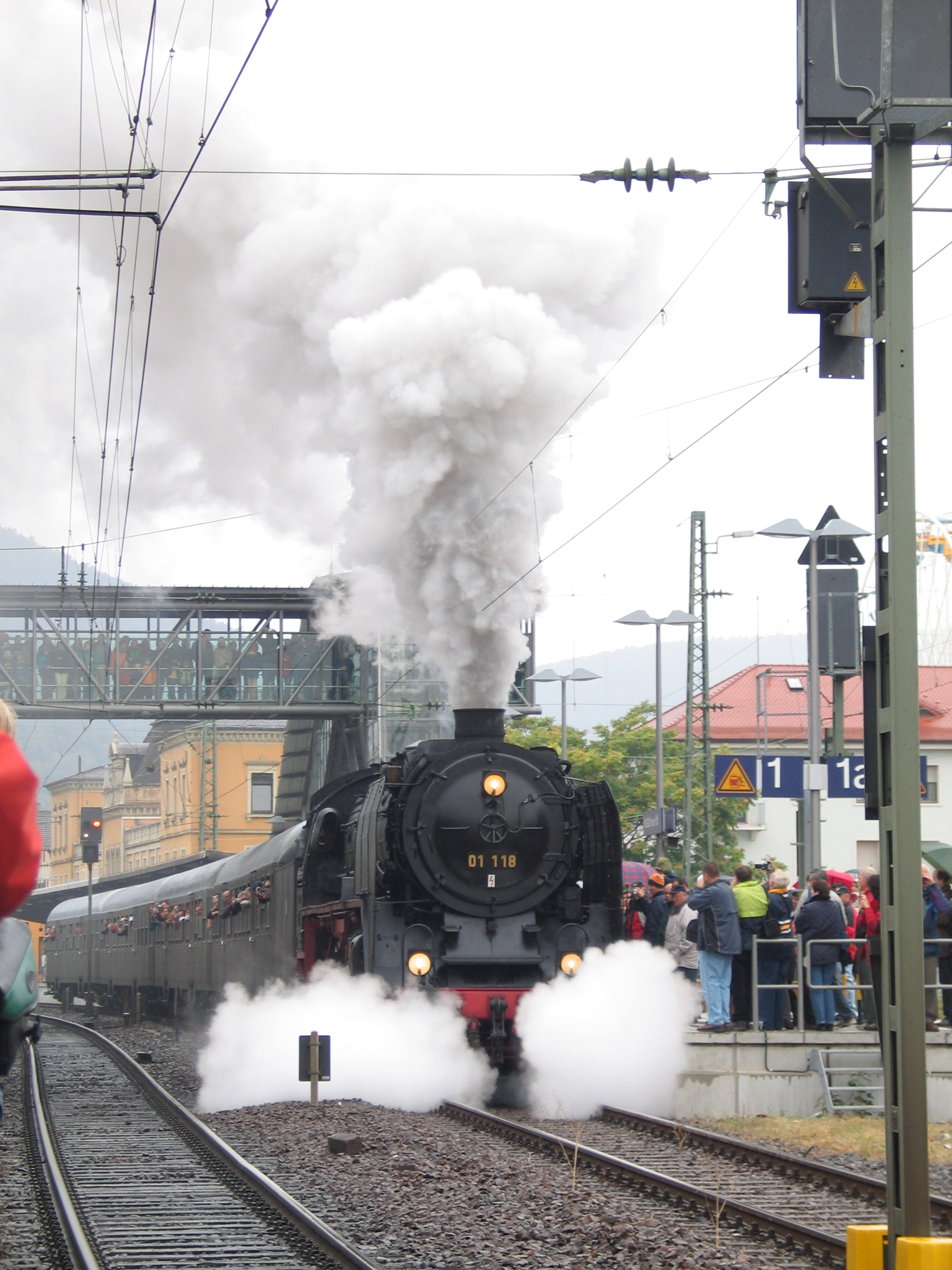 Dampflok 01 118 bei der Ausfahrt aus dem Hbf Neustadt an der Weinstraße im Rahmen der 150-Jahre-Feier für die Maximiliansbahn